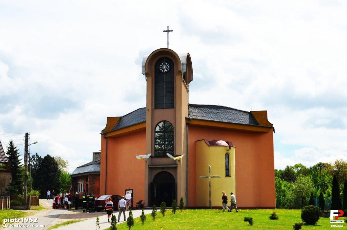 Kościół św Floriana w Czekanowie